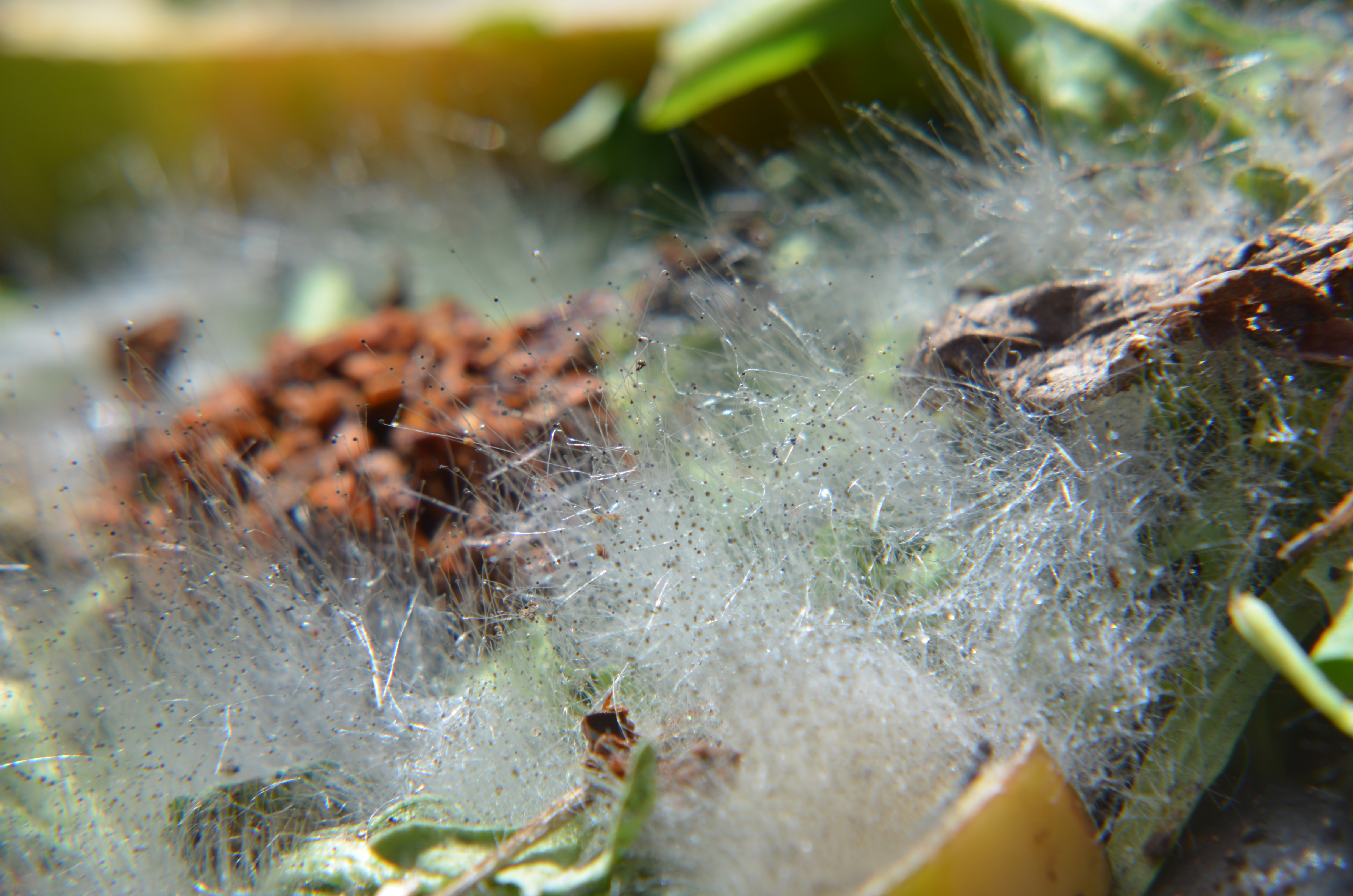 Diese Schimmelpilze habe ich auf meinem Kompost entdeckt.